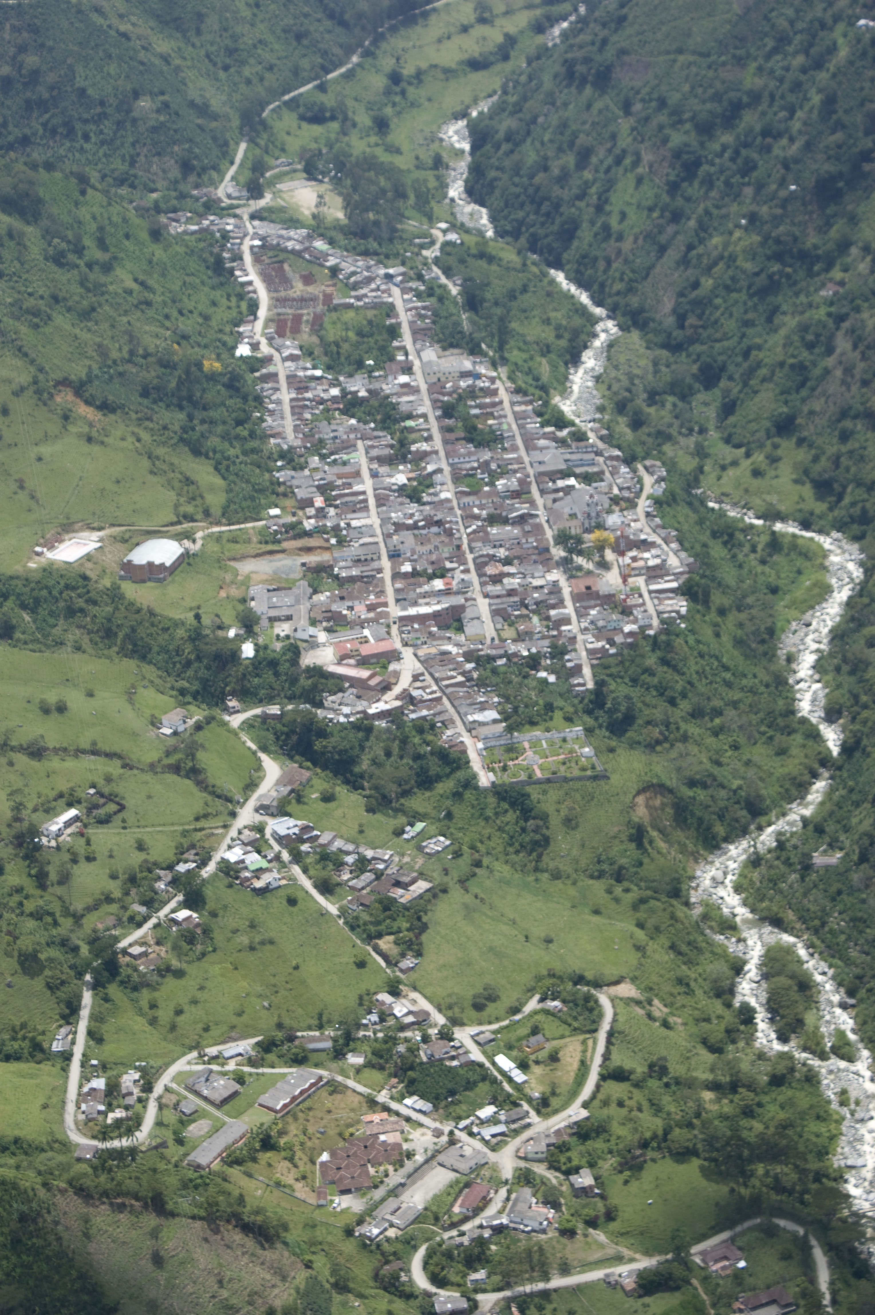 San Andrés de Cuerquia, en el departamento de Antioquia, donde se ejecutan las obras de Hidroituango.